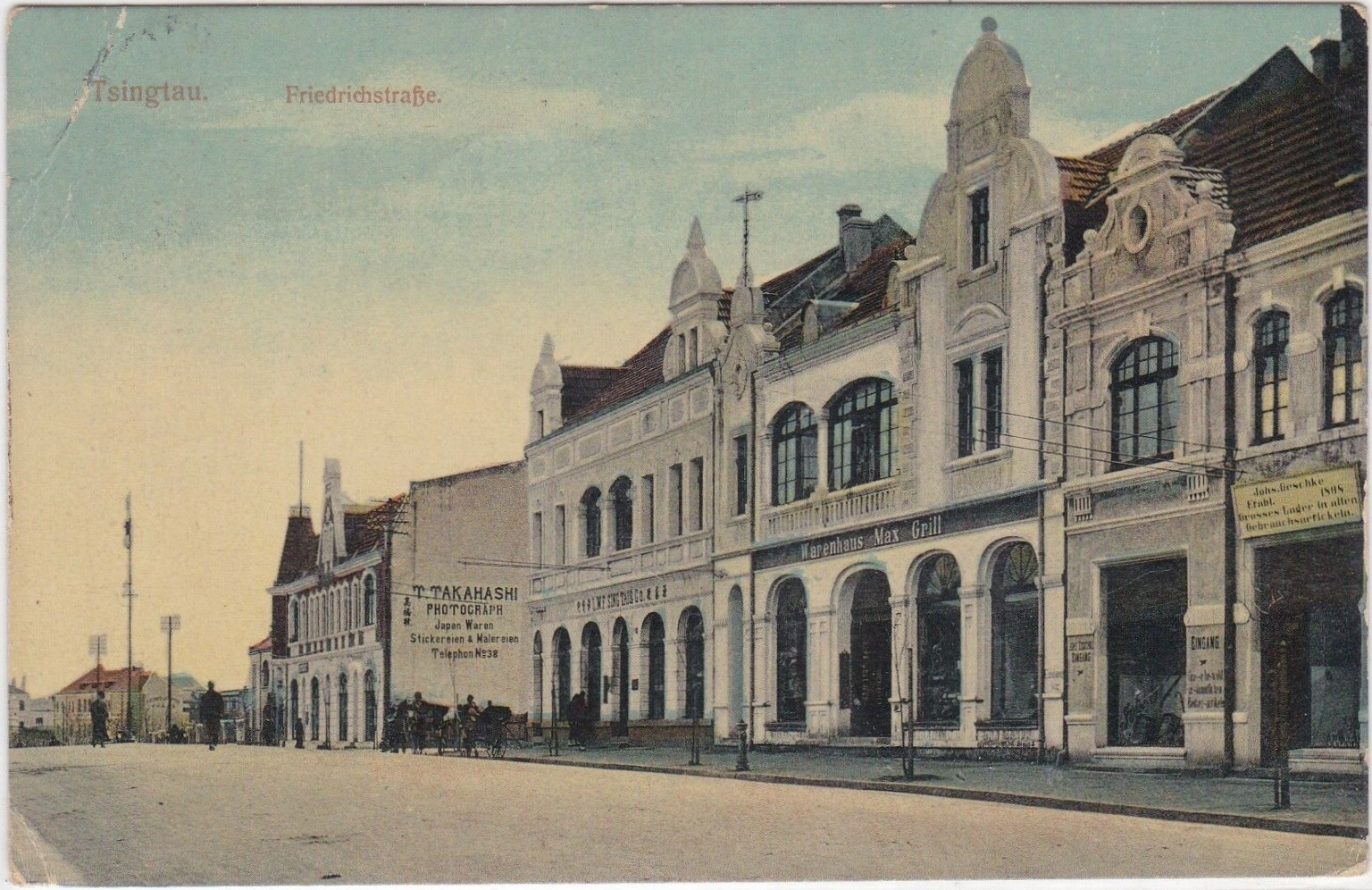 青岛弗里德里希街北段街景